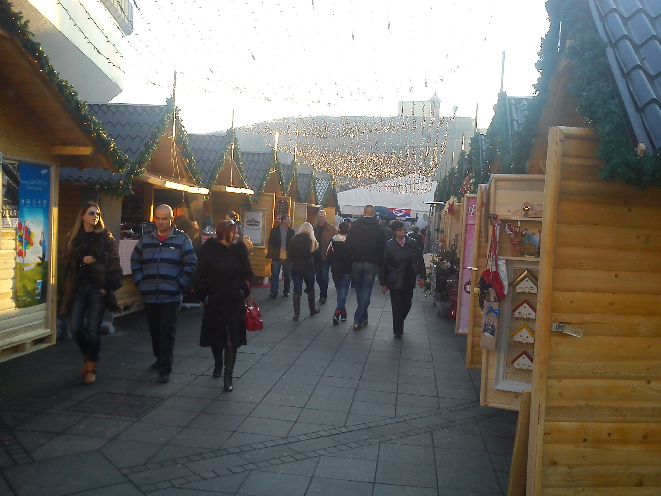 Зимски град - ЗИМЗОГРАД, у центру Бањалуке